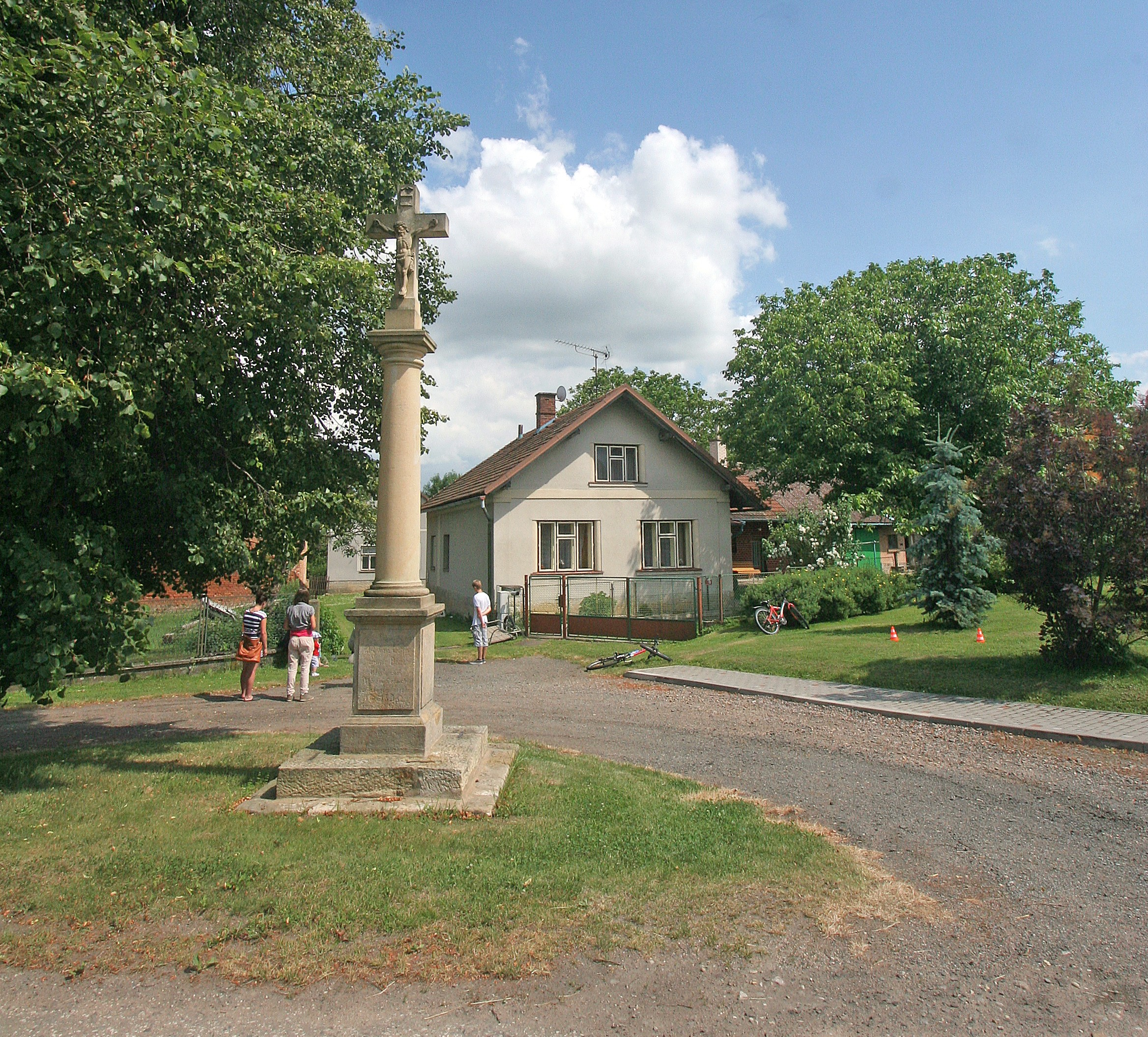 Rašín krucifix